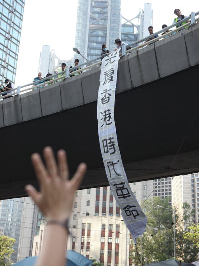 「光復香港時代革命」手寫標語在中銀大廈前天橋，示威者做「五大訴求」手勢